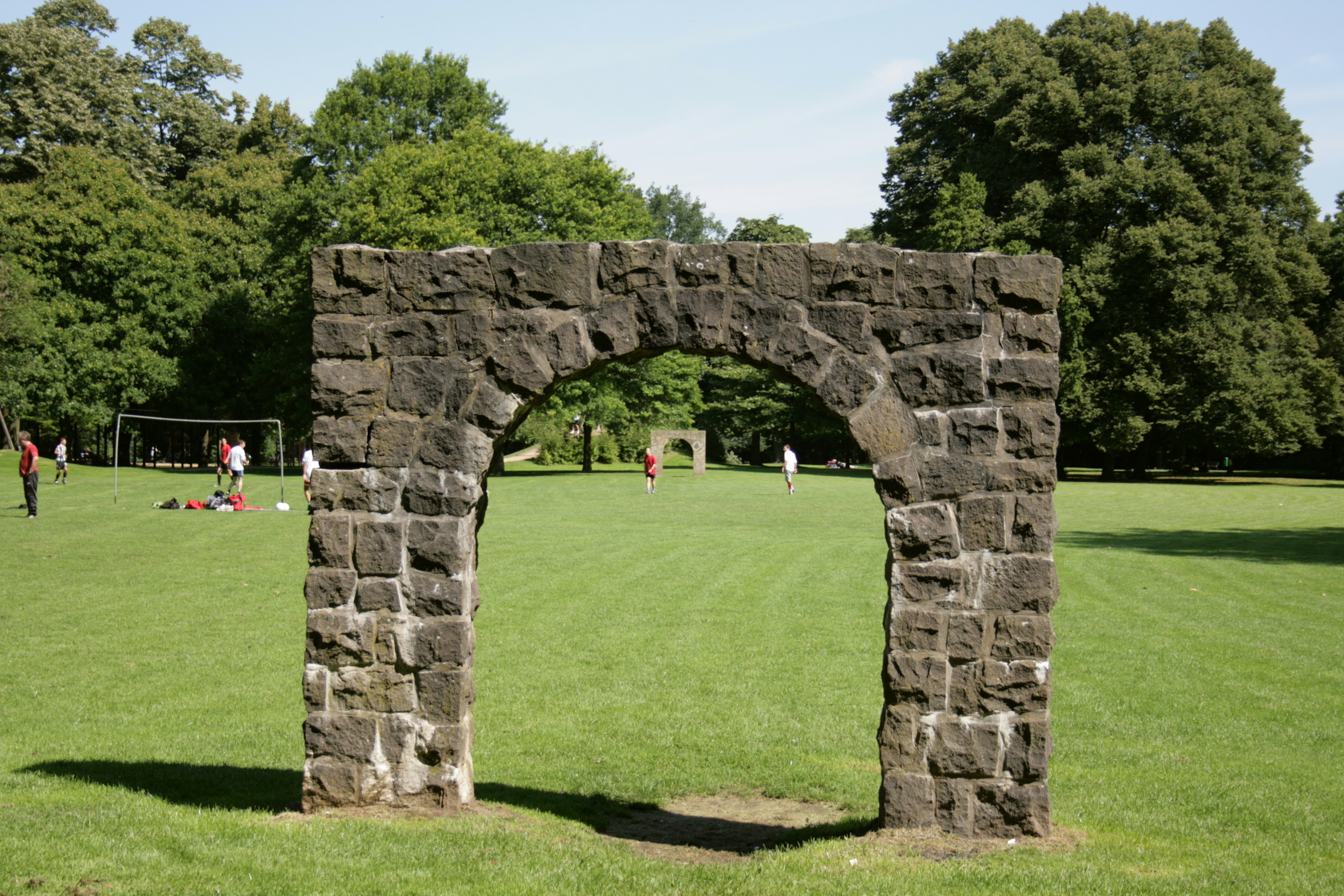 Brehminsel der Ruhr in Essen-Werden